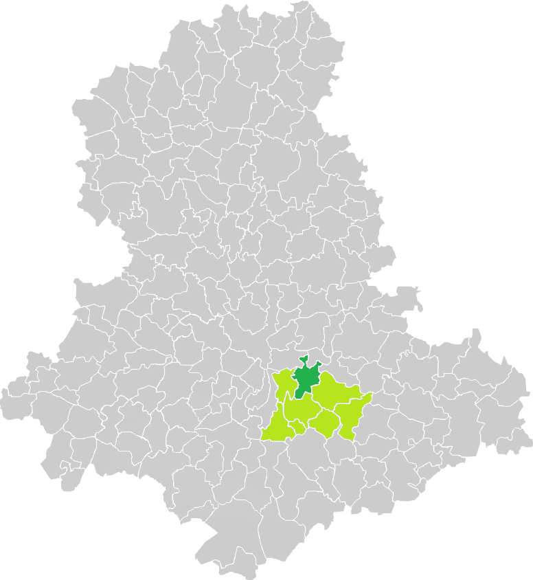 Carte de situation de la commune de Eyjeaux (en vert foncé) dans le votre Canton (en vert clair) sur une carte des communes de la Haute-Vienne